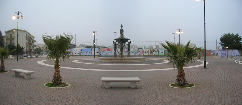 Siponto. Piazza Falcone e Borsellino. - Salvatore Triventi - FotoDaSogno